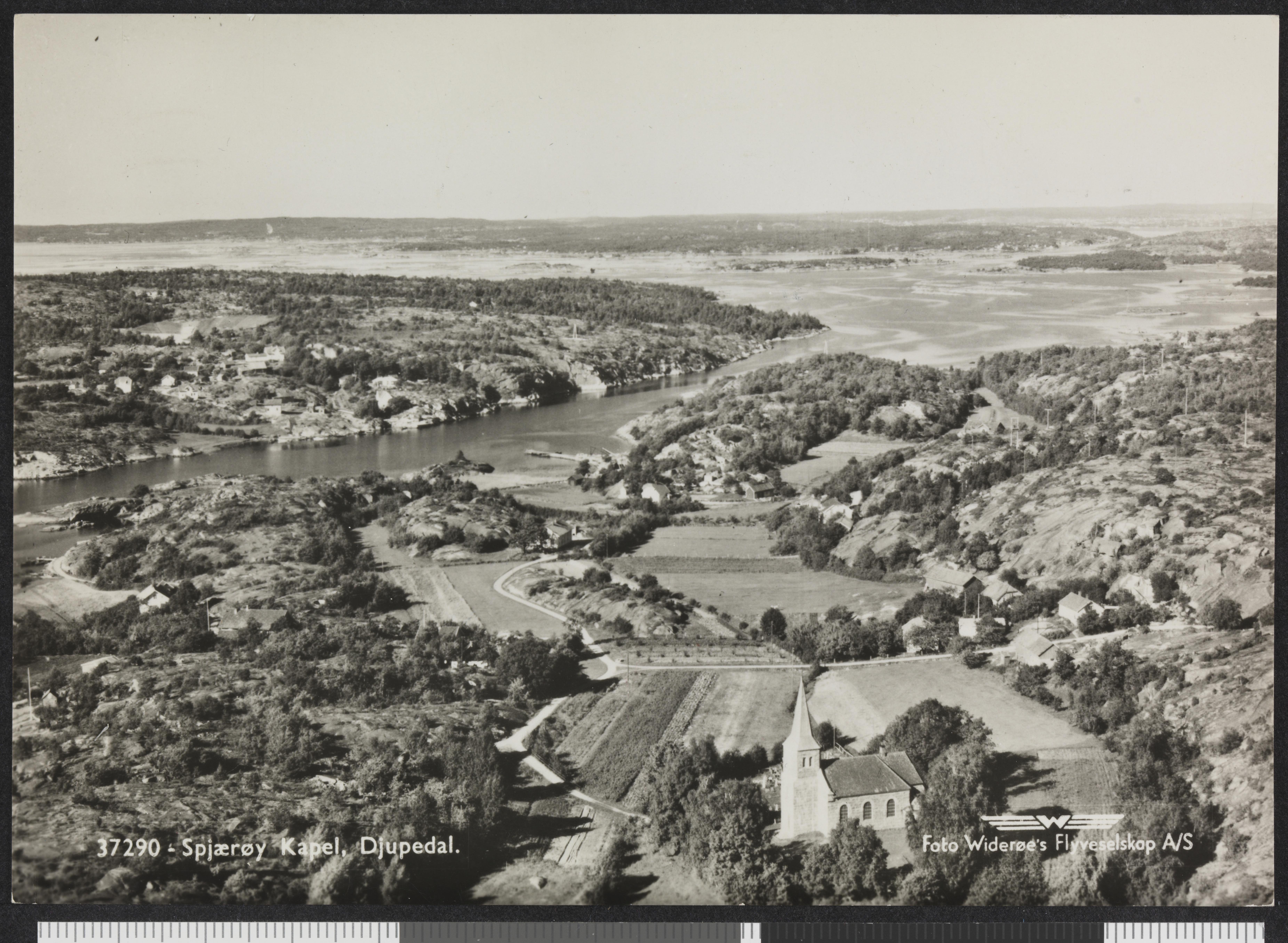 Bildet er hentet fra Nasjonalbibliotekets bildesamling Spjærøy,Spjærøy kirke,Vesterøy, Hvaler, Østfold